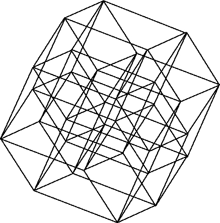 Пятимерный куб